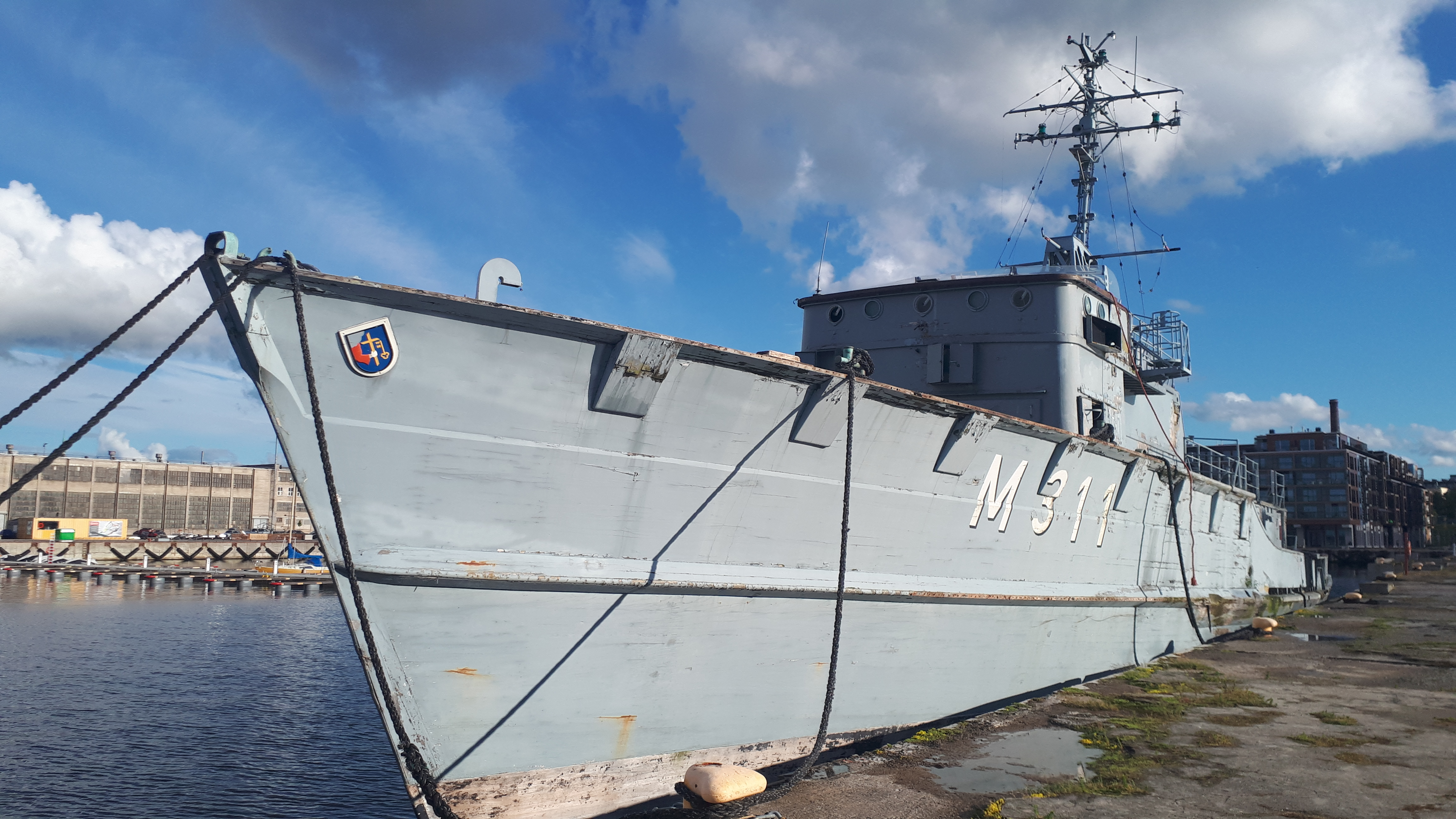 Endine Eesti Mereväe laev Wambola (M311) Noblessneri sadamas. Laeva vööris on näha Wambola sõpruslinna Pärnu vapp.